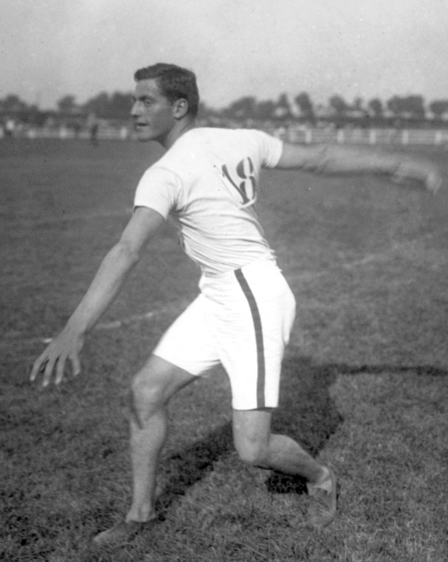 [Merritt] Giffin lançant le disque, 1er août 1908 [meeting international d'athlétisme, à Colombes] : [photographie de presse] / [Agence Rol]